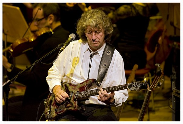 El guitarrista John Parsons en plena actuación.